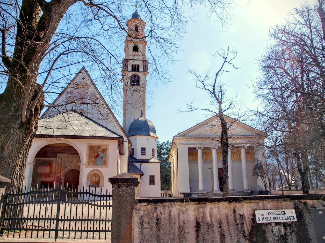 Cavalese